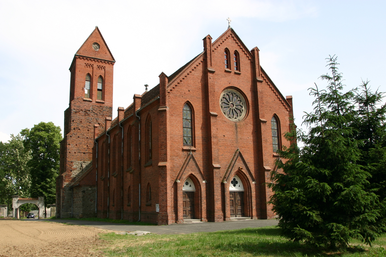 Brzezimierz wieś w Polsce położona w województwie dolnośląskim, w powiecie oławskim, w gminie Domaniów.